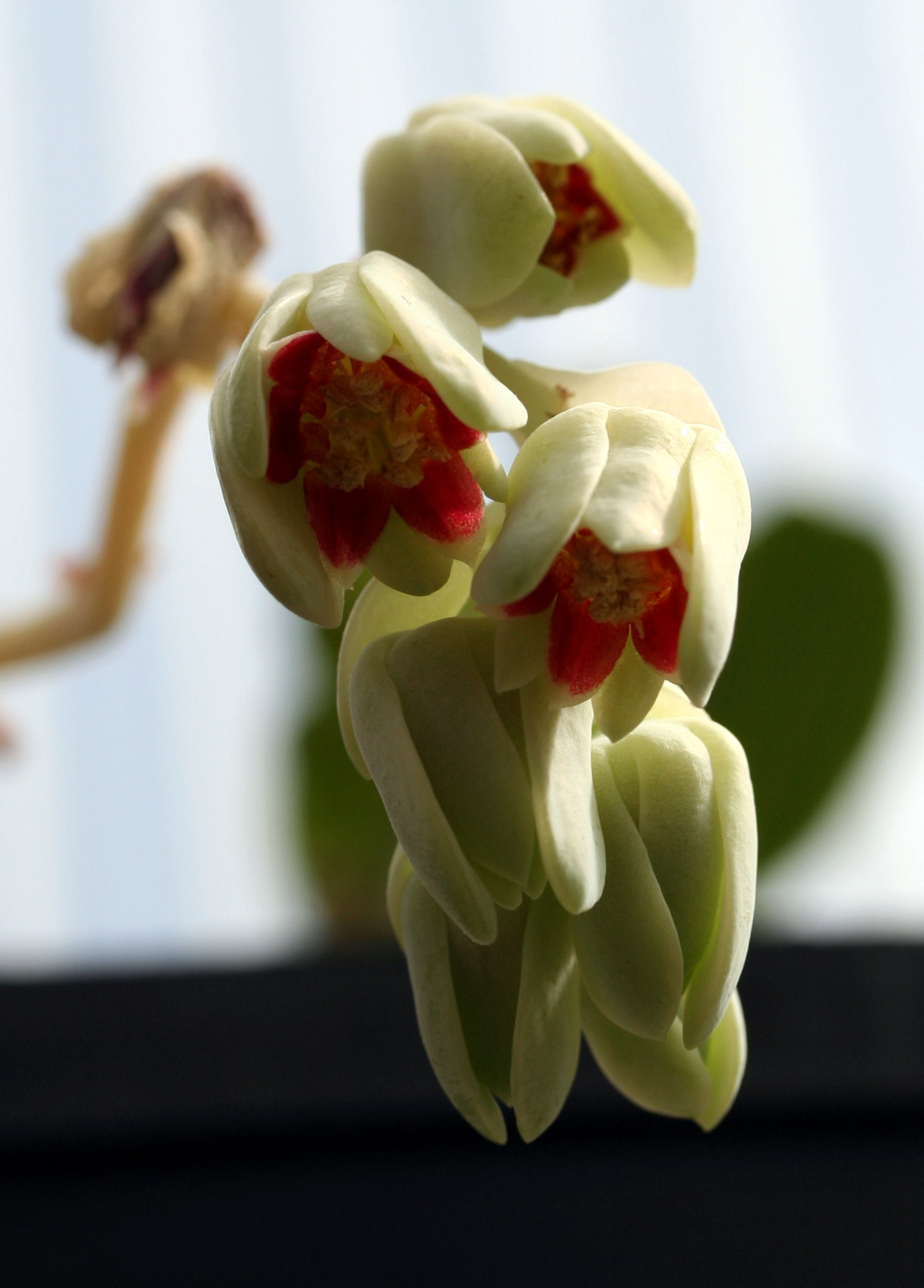 Pachyphytum oviferum